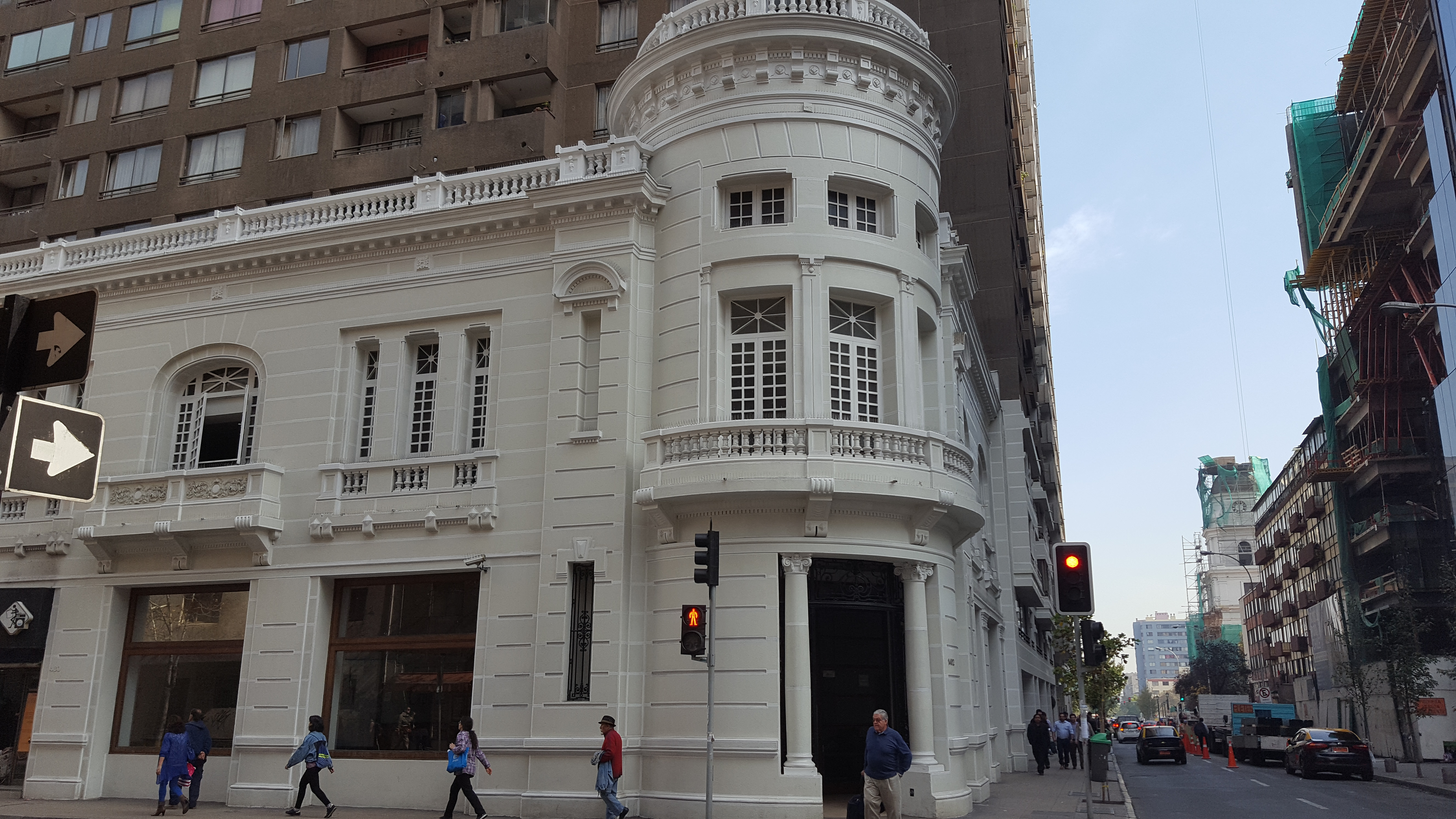 Fachada del ex-palacio Ruiz Tagle